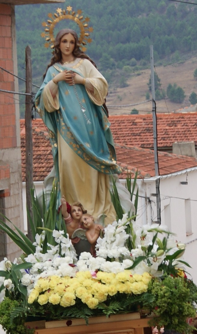 Fotografía de la Inmaculada Concepción, patrona de la localidad de La Vegallera durante su procesión en el mes de agosto.